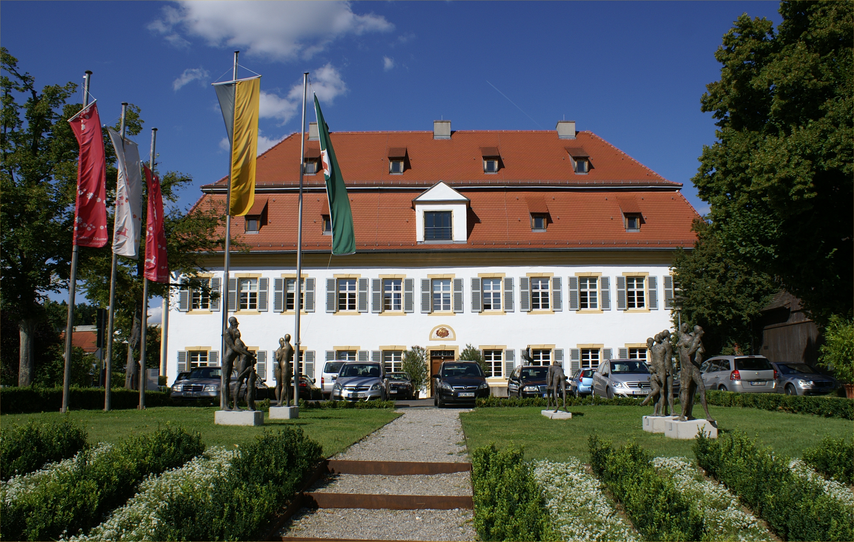 Das im Jahr 1721 erbaute Neue Schloss in Rechberghausen dient heute als Rathaus.